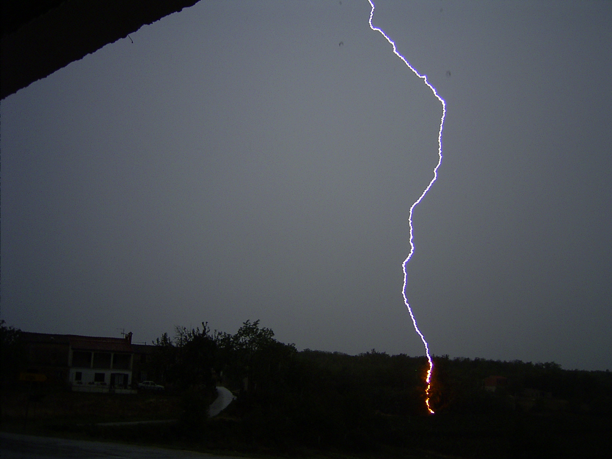 Linienblitz, aufgenommen in Ferenci 2003